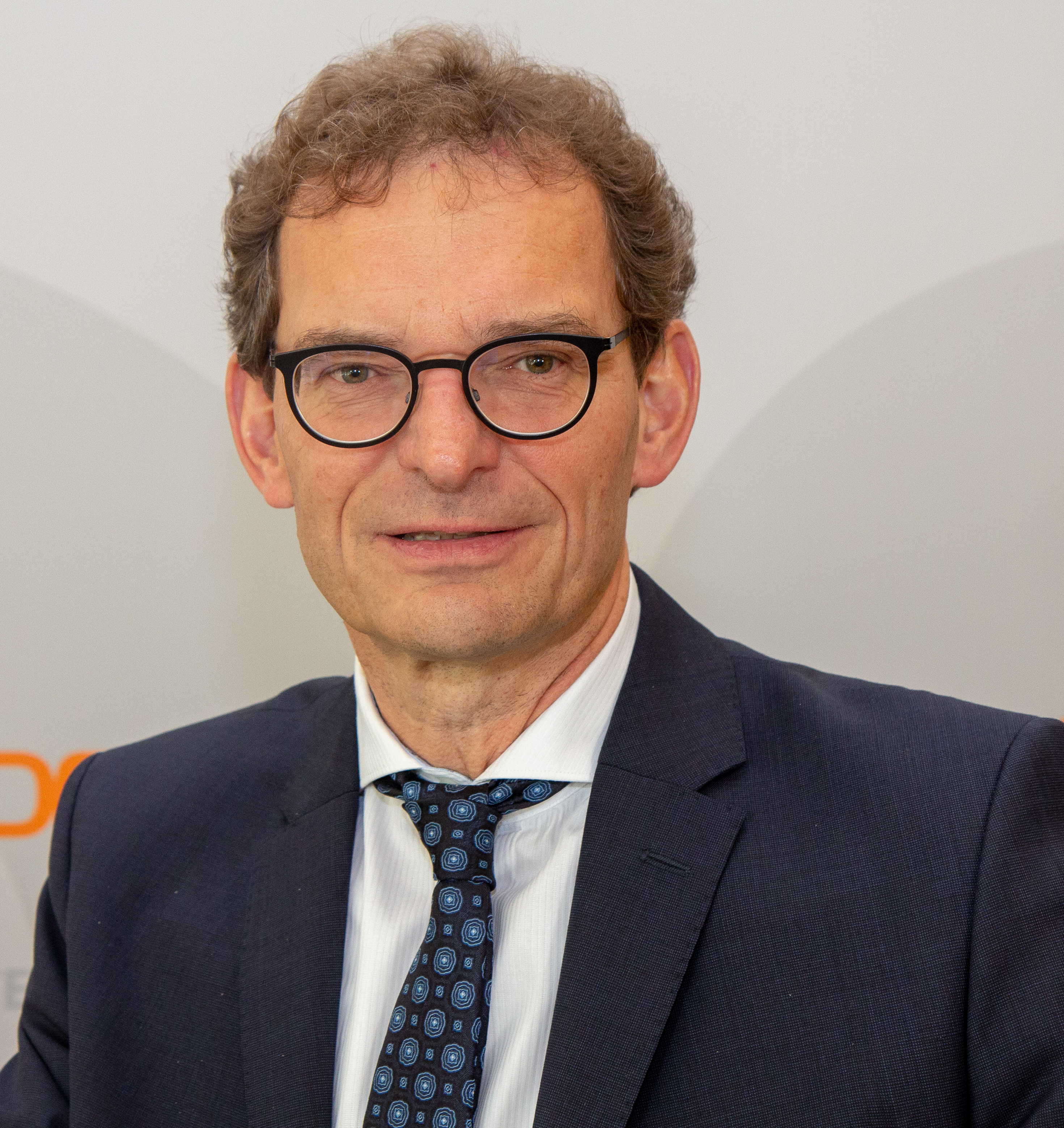 Alexander Stock als Teilnehmer bei der Sitzung des ZDF-Fernsehrat am 29. Juni 2018 in Mainz.